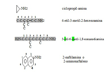 Nomenclatura de Aminas